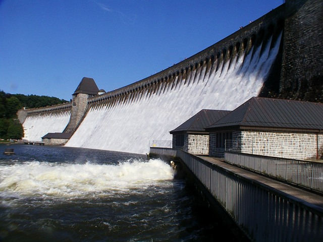 Überlauf Möhnetalsperre